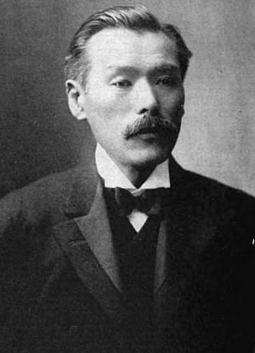 日比谷平左衛門。明治-大正時代の実業家。綿糸商から鐘紡会長などを務める。